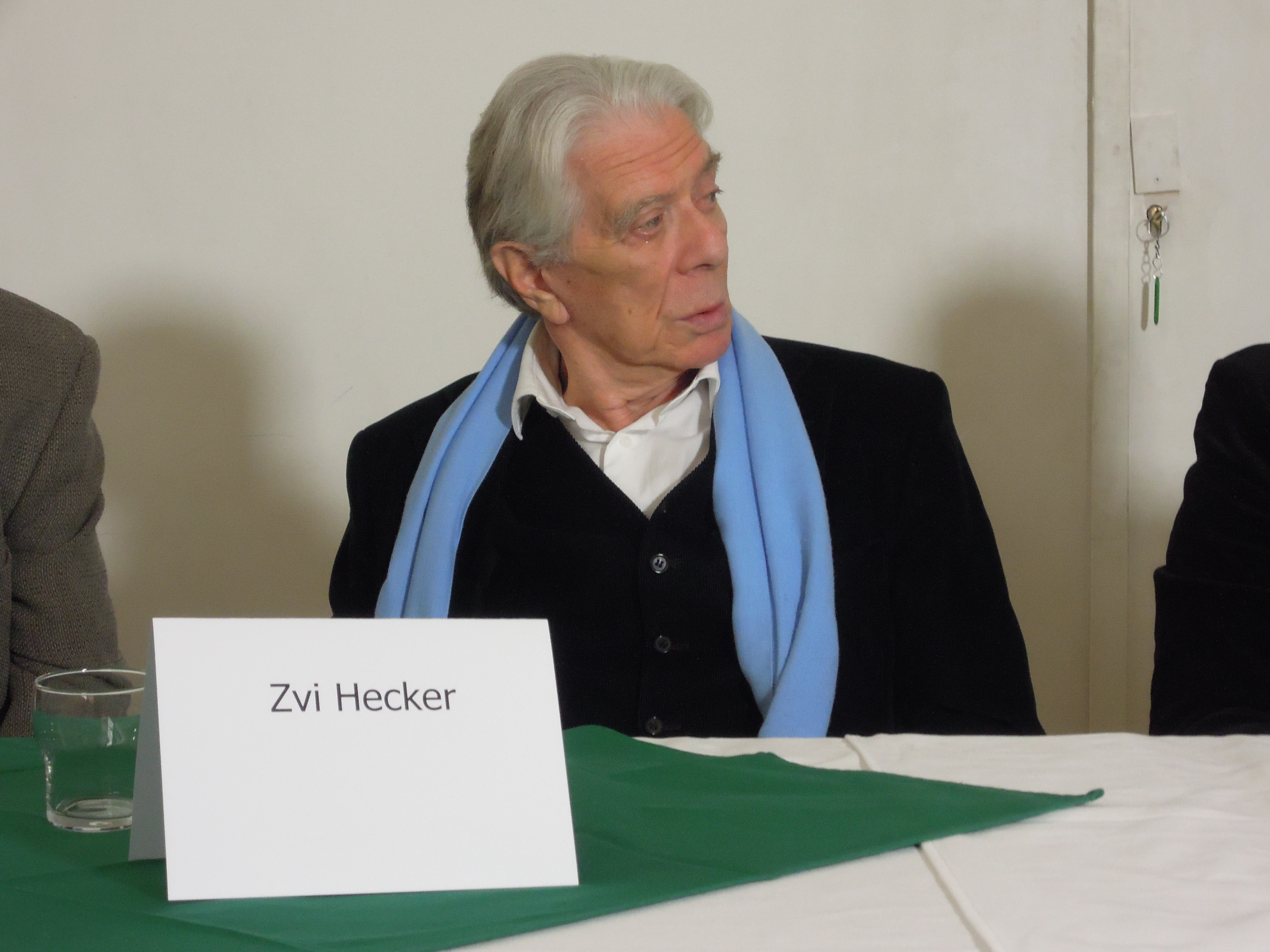 Zvi Hecker na tiskové konferenci v ostravském Domě umění, 2014